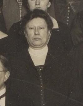 Beschrijving Groepsfoto in de trouwkamer derde klasse van het Stadhuis, Oudezijds Voorburgwal 195-201, ter gelegenheid van de viering van het 25-jarig dienstjubileum van vier leden van de plaatselijke commissie van toezicht op het lager en voorbereidend onderwijs (schoolcommissie): mevrouw S.A. Levenbach-Asscher (staand, midden-voor) en mevrouw S. Katz-Geesink (rechts, zittend) en de heren Th.A. Geels en J.W. Sleef. Links, zittend, voorzitter prof.dr. R.H. woltjer Met pijl gemarkeerd mevrouw L.C.M. Ketelaar-Struyken. Documenttype foto Vervaardiger Onbekend Anoniem Collectie Collectie Stadsarchief Amsterdam: foto-afdrukken Datering 1927 Geografische naam Oudezijds Voorburgwal Inventarissen Afbeeldingsbestand ANWK00056000001